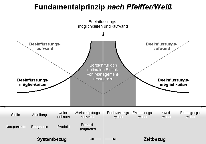 Fundamentalprinzip effektiver und effizienter Wertschöpfungsnetzwerkgestaltung, Rationalisierung, Systemrationalisierung, Lean Management